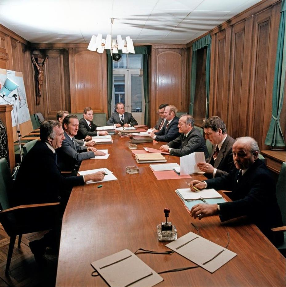 Regierungssitzung der Vorarlberger Landesregierung Keßler III am 31. Jänner 1977. Regierungsmitglieder (v.l.n.r.): Regierungsmitarbeiter, Regierungsmitarbeiter, Karl-Werner Rüsch, Siegfried Gasser, Herbert Keßler, Rudolf Mandl, Konrad Blank, Elmar Rümmele, Fredy Mayer, Regierungsmitarbeiter